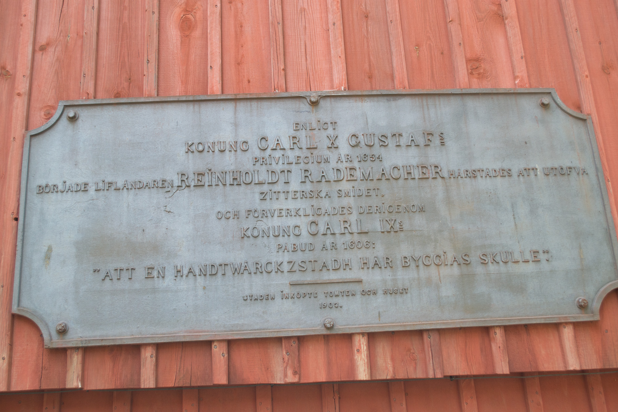 Rademashersmedjorna-6